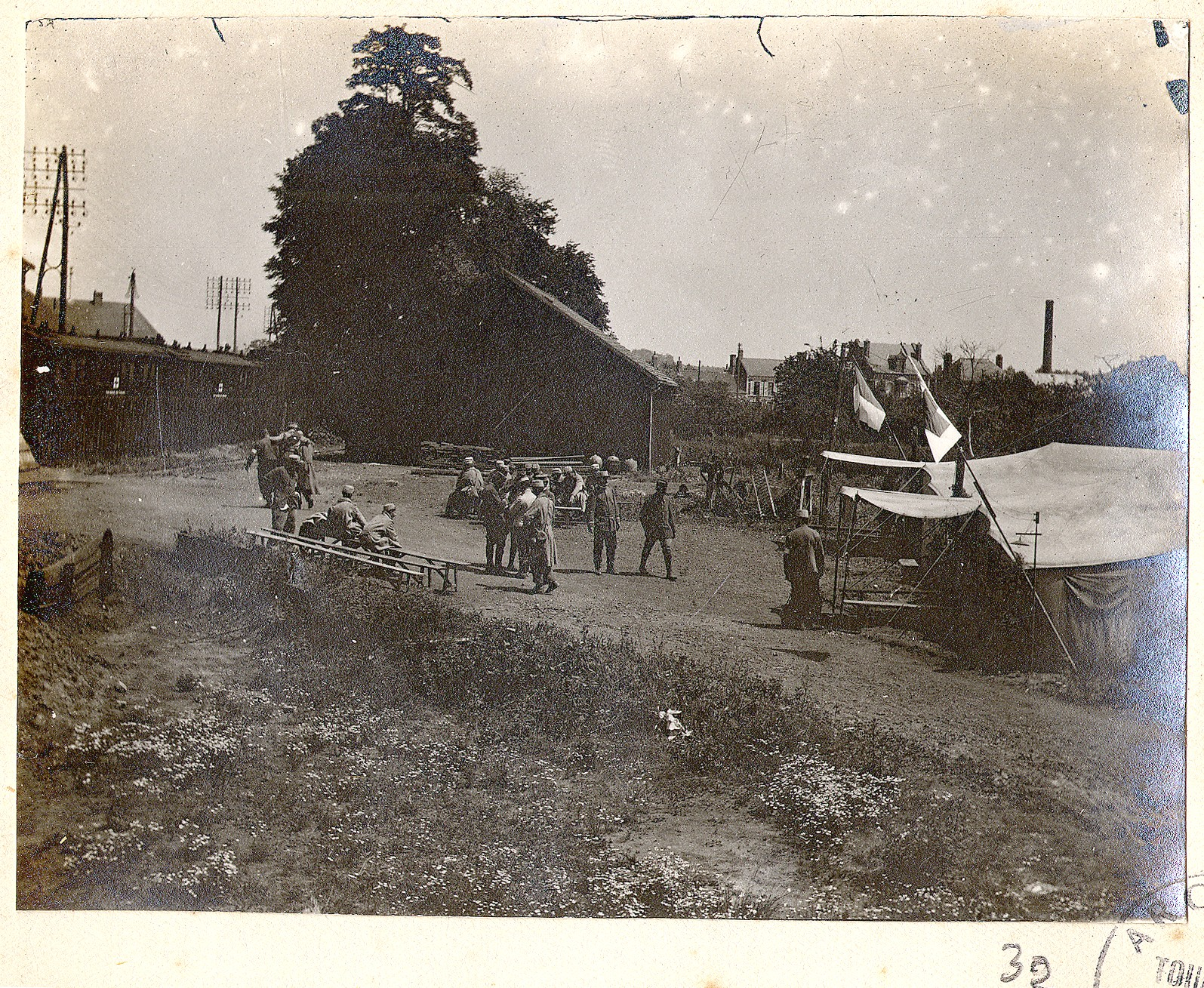 Des blessés embarquent dans un train sanitaire au départ de la gare d'évacuation de Corbie (Somme). 1915. Guerre 1914-1918.